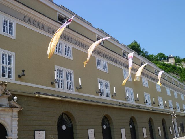 Großes Festspielhaus - Inschrift Michels